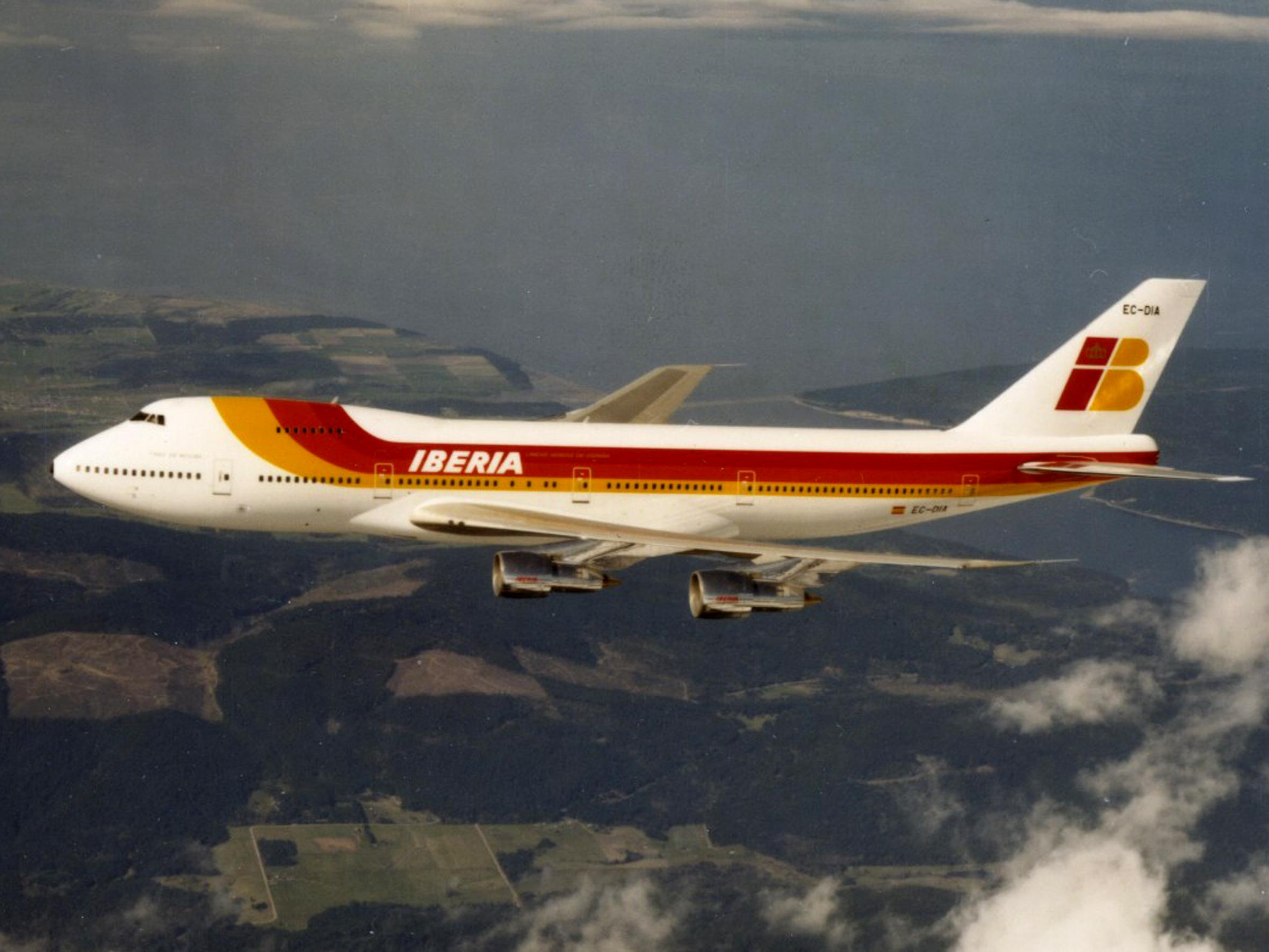 EC-DIA